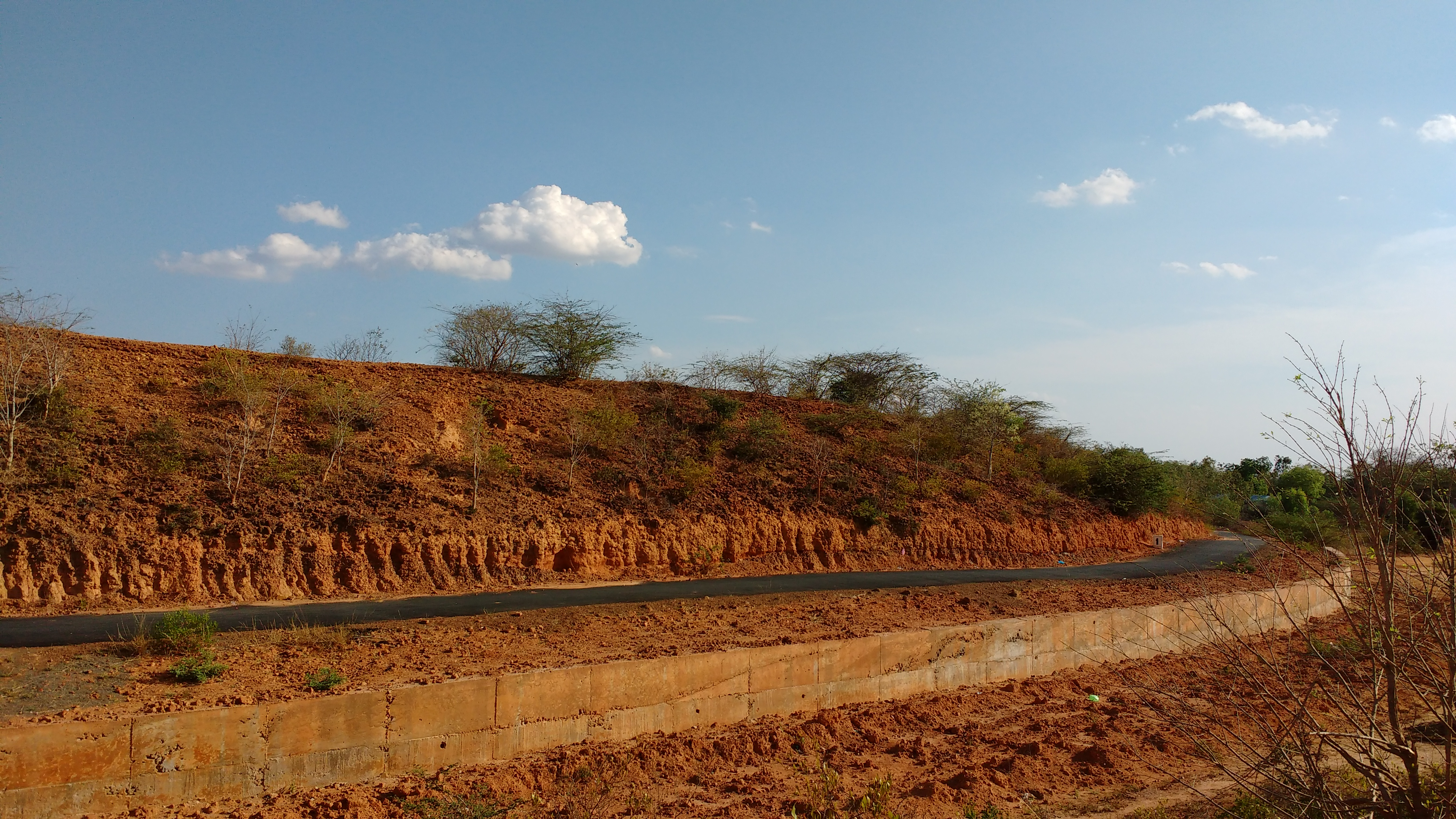 சிதிலமடைந்த பொற்பனைக்கோட்டை சுற்றுச்சுவர்